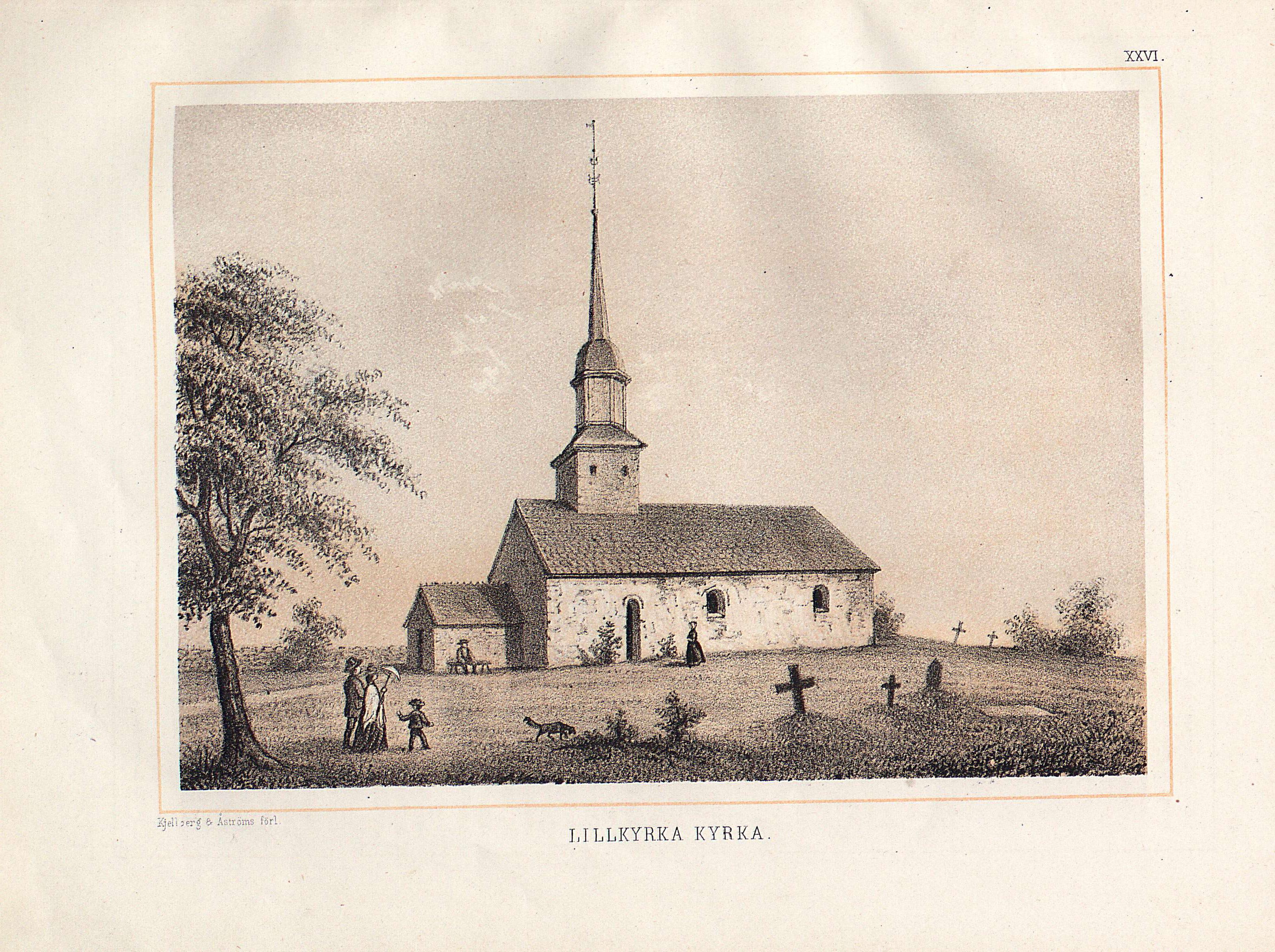 Lillkyrka kyrka, Östergötland 1874